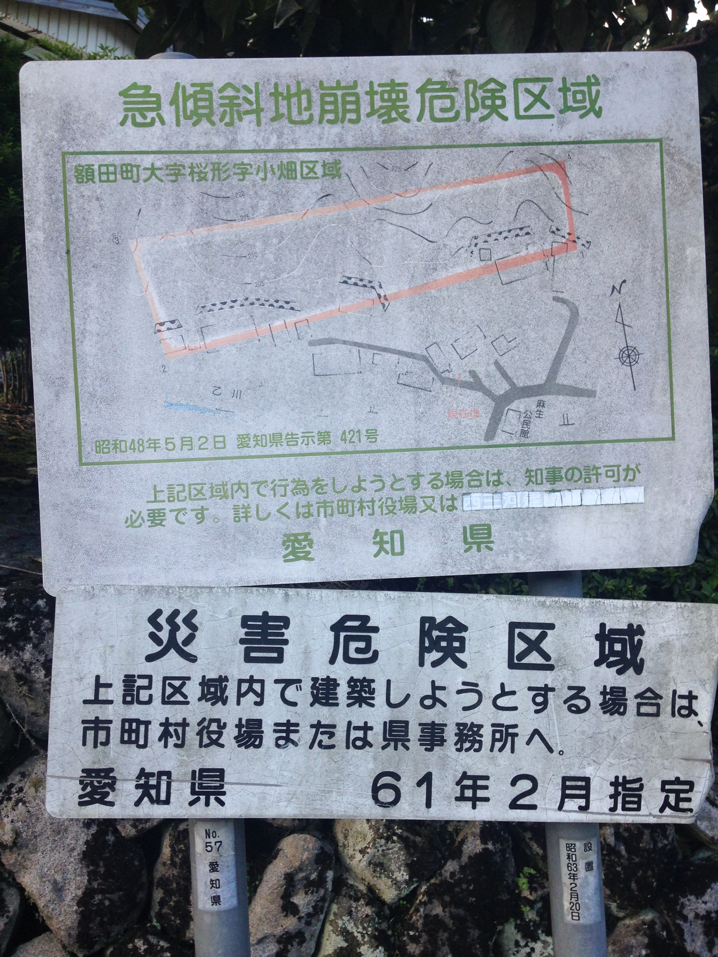 桜形町字小畑の画像